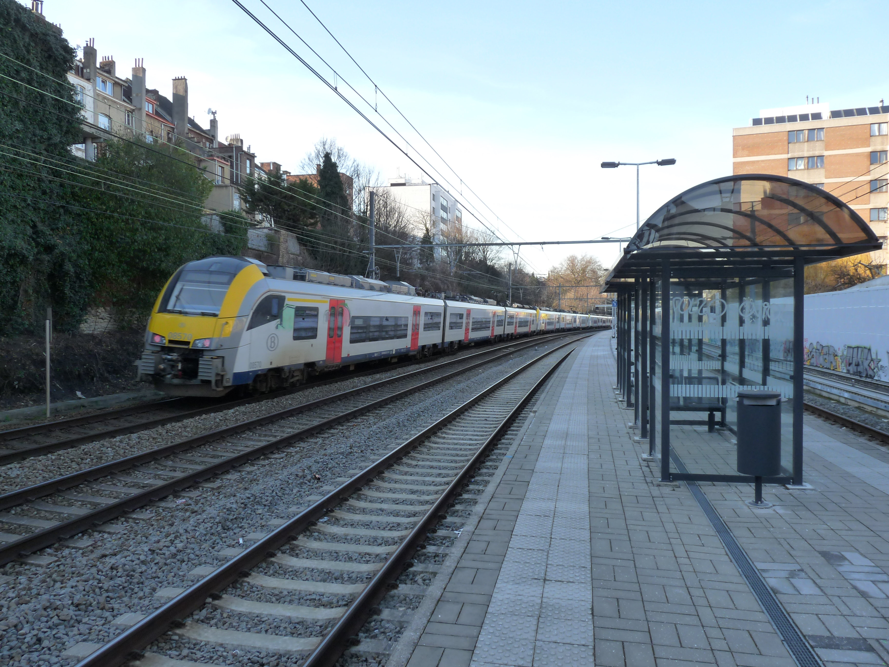 De nieuwe halte Mouterij in Brussel